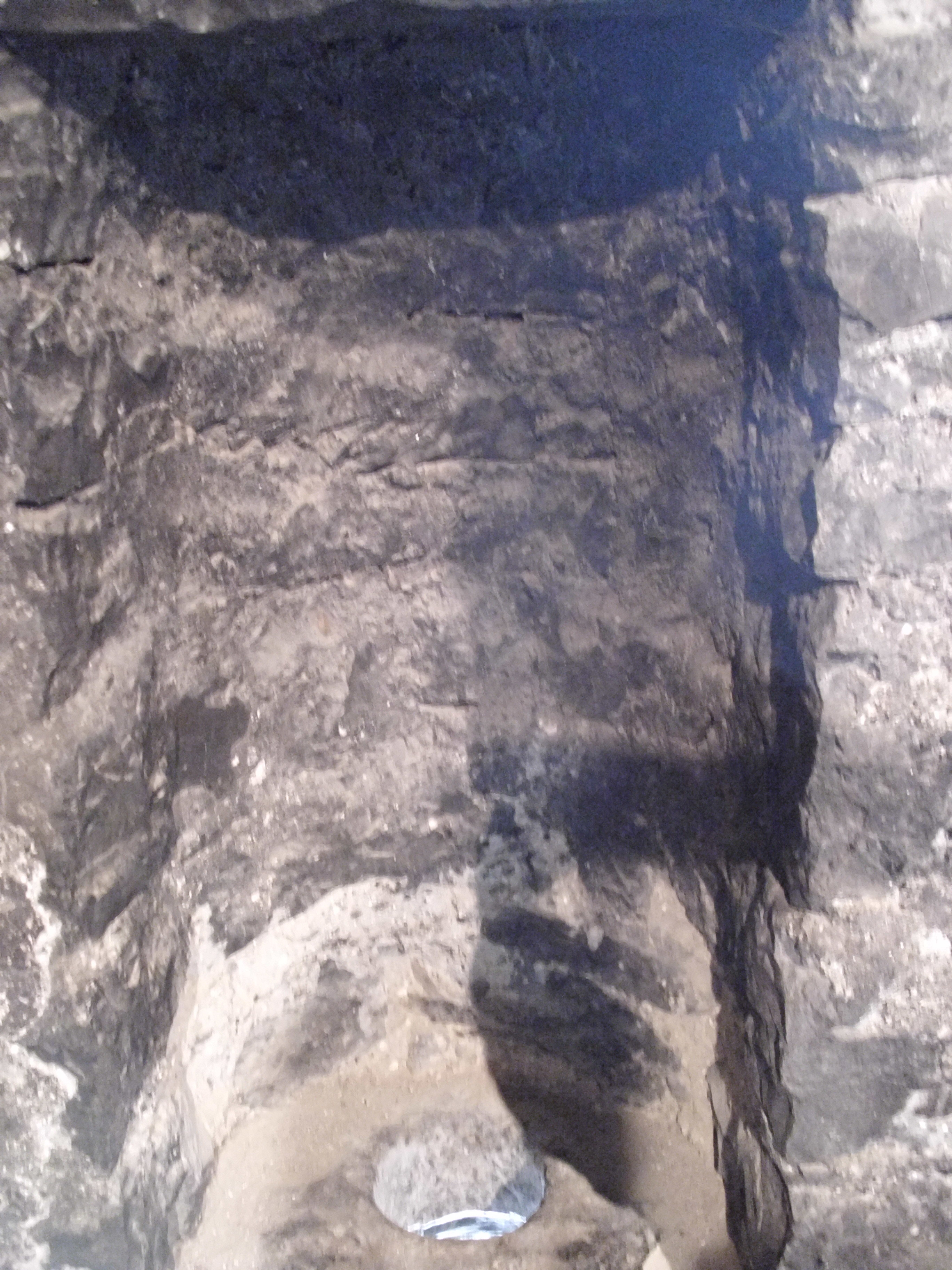 Retrete de la planta superior de la cárcel de Broto.